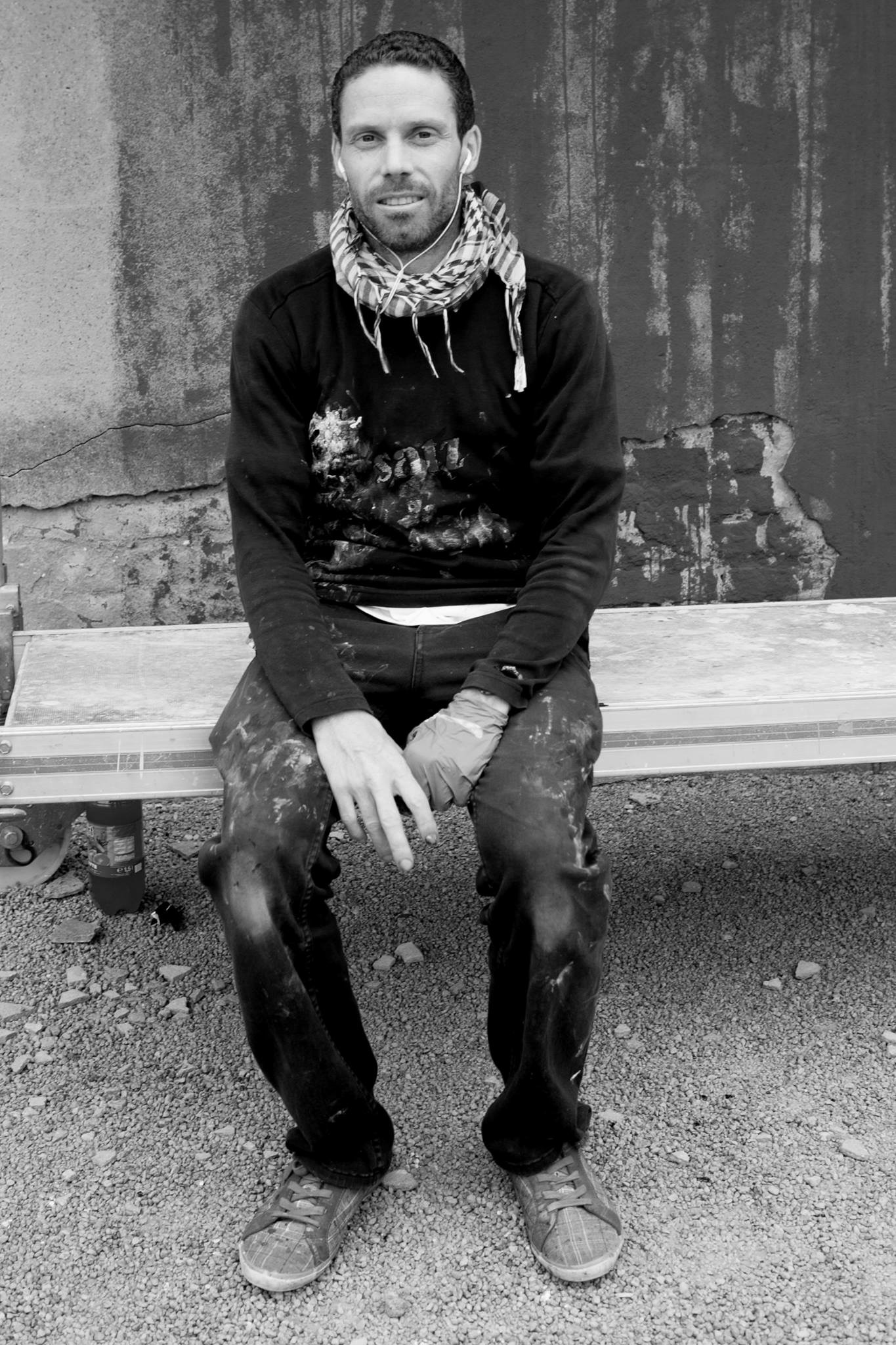 Düffels nach der Fertigstellung eines seiner Werke in Goch.